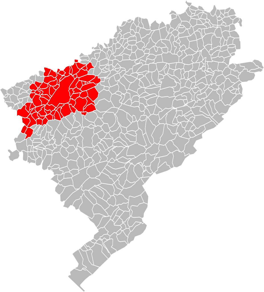 Localisation de la Communauté d'Agglomération du Grand Besançon dans le département du Doubs. Les limites de la communauté d'agglomération ainsi que les limites des communes qui la constituent sont celles qui sont effectives au 1er janvier 2017.